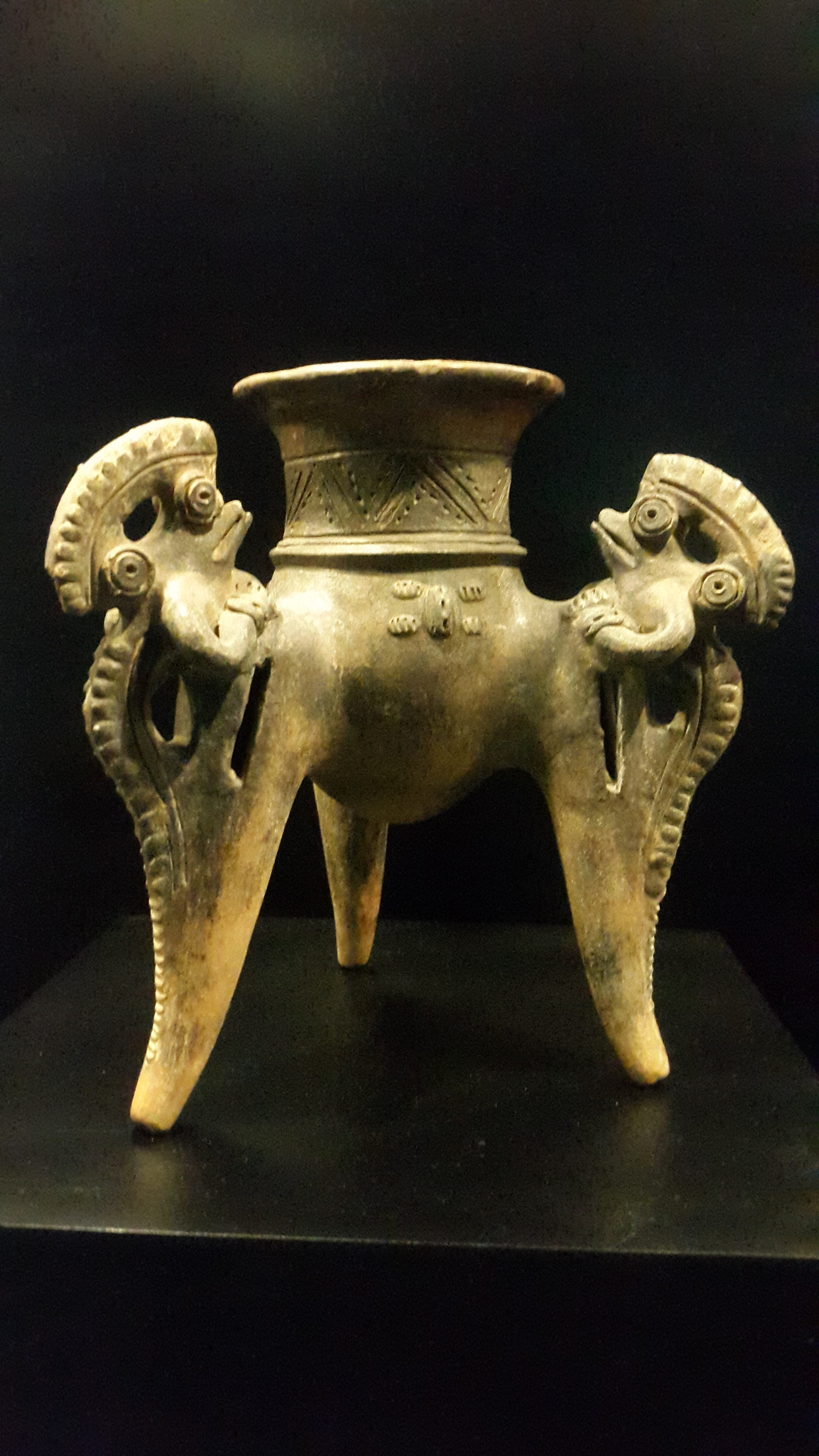 Jarrón trípode estilo África, fase La Selva, del Caribe Central de Costa Rica. Museo del Jade.